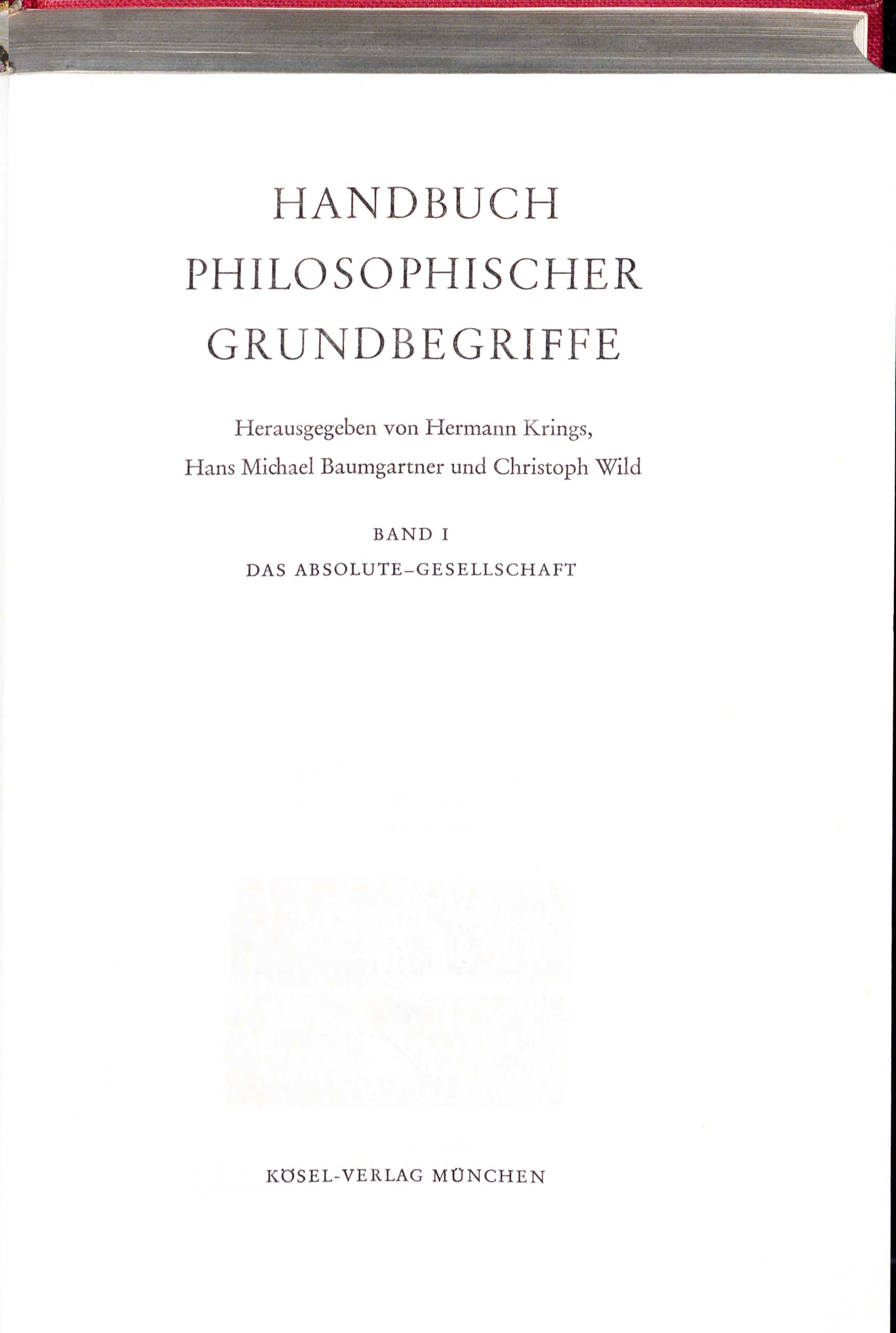 Hermann Krings (Hrsg.): Handbuch philosophischer Grundbegriffe. München : Kösel, 1973, Titel